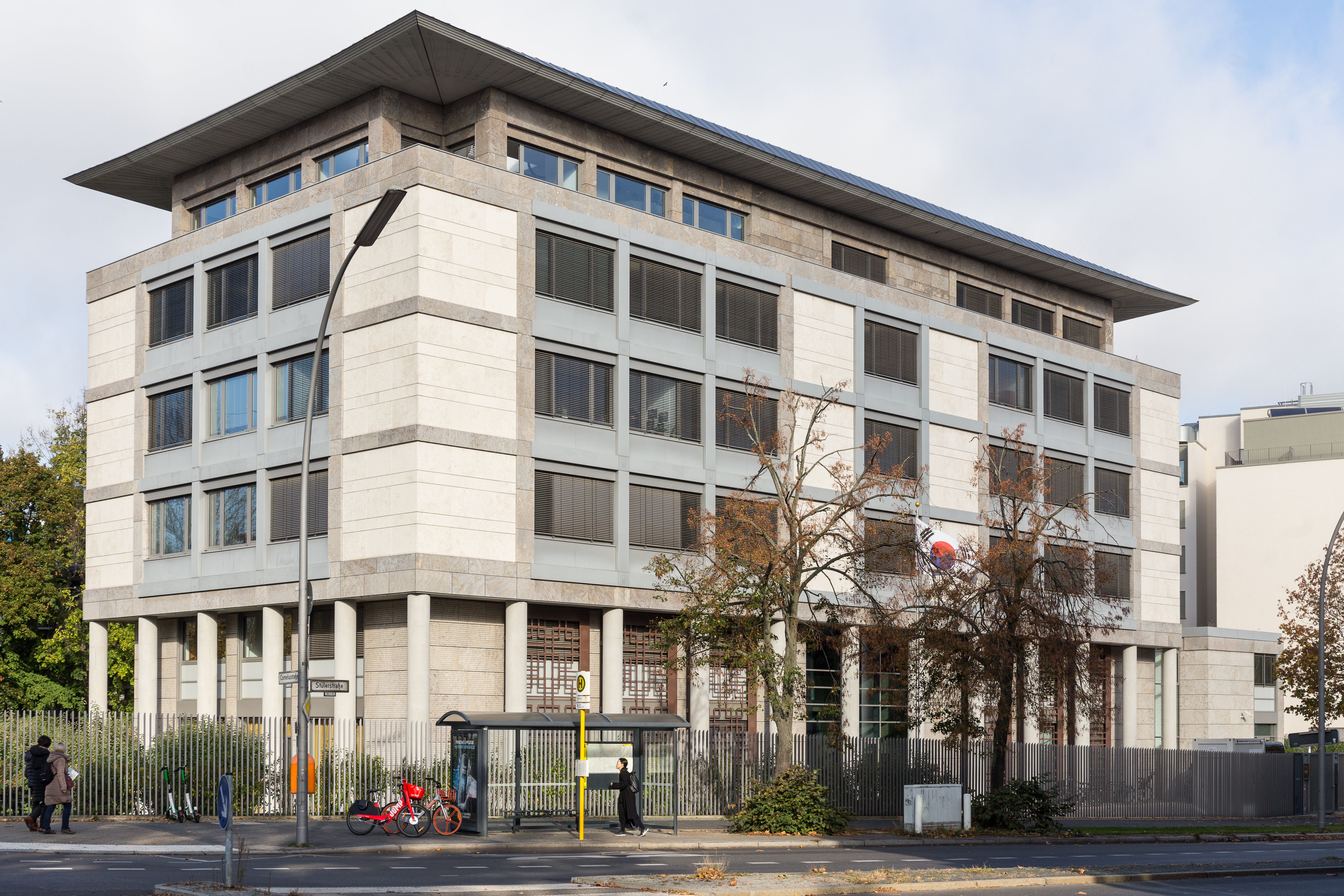 Ambassade de Corée du Sud à Berlin, Stülerstraße 8/10.